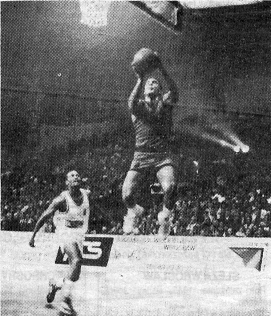 Nikos Galis (zespół Aris Saloniki, w wyskoku) i Keith Williams (PCS Śląsk Wrocław)